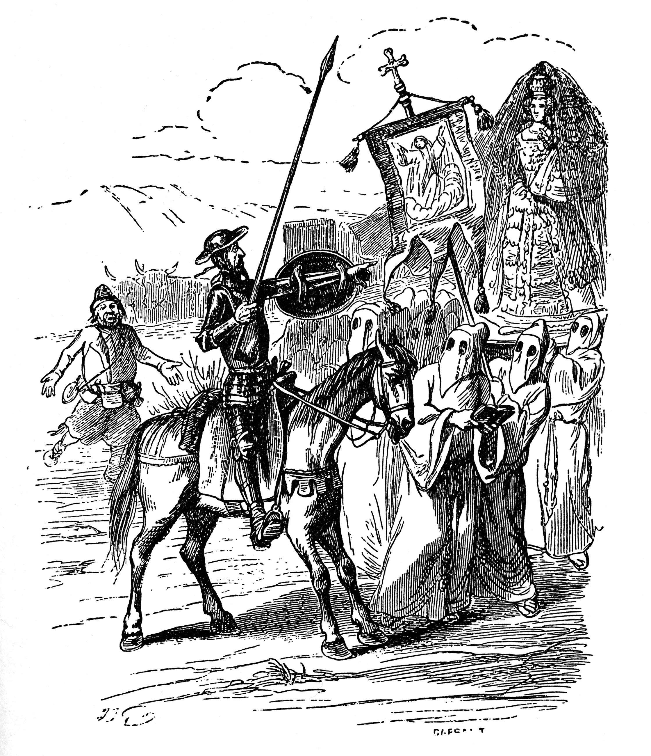 Der fahrende Ritter Don Quijote de la Mancha. Die Prozession der Büßer (I: 52) Grandville: Illustration zu Don Quijote (Buch 1, Kapitel 52), 1848